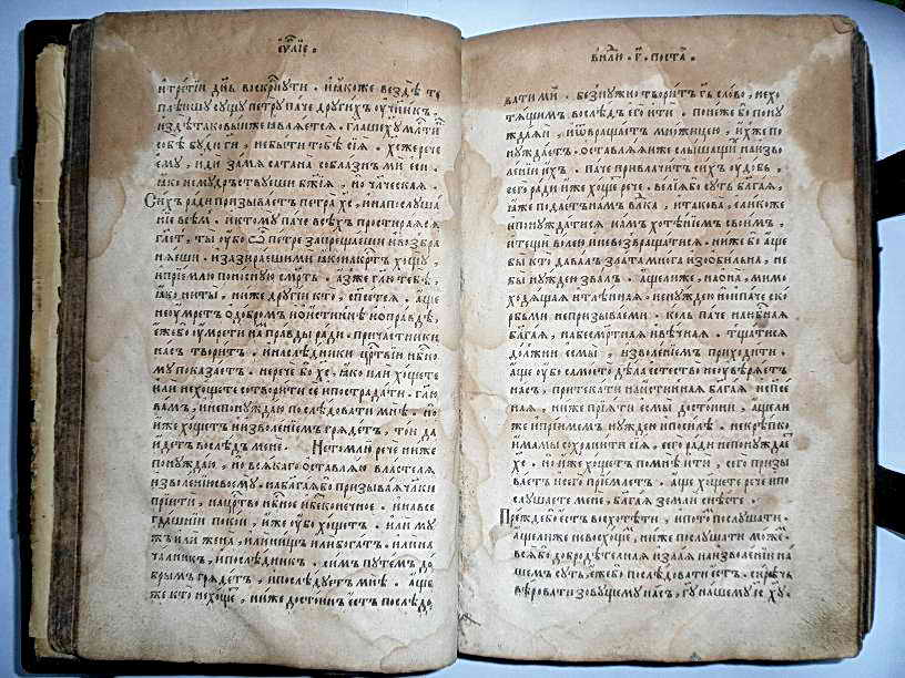 Беларуская (тарашкевіца): Заблудаўскае Эвангельле (1568—1569). Разварот